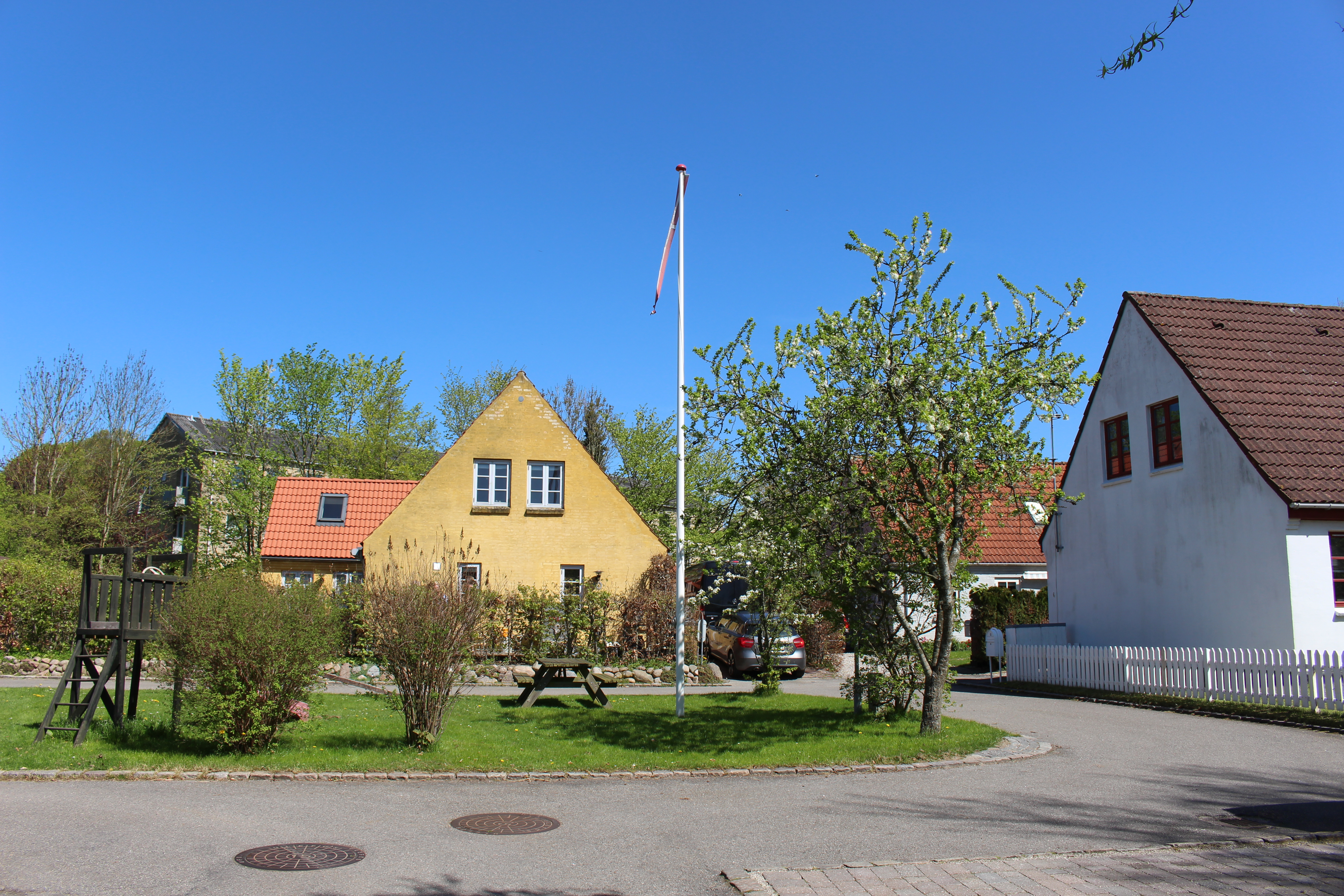 Nye huse i Vridsløselille